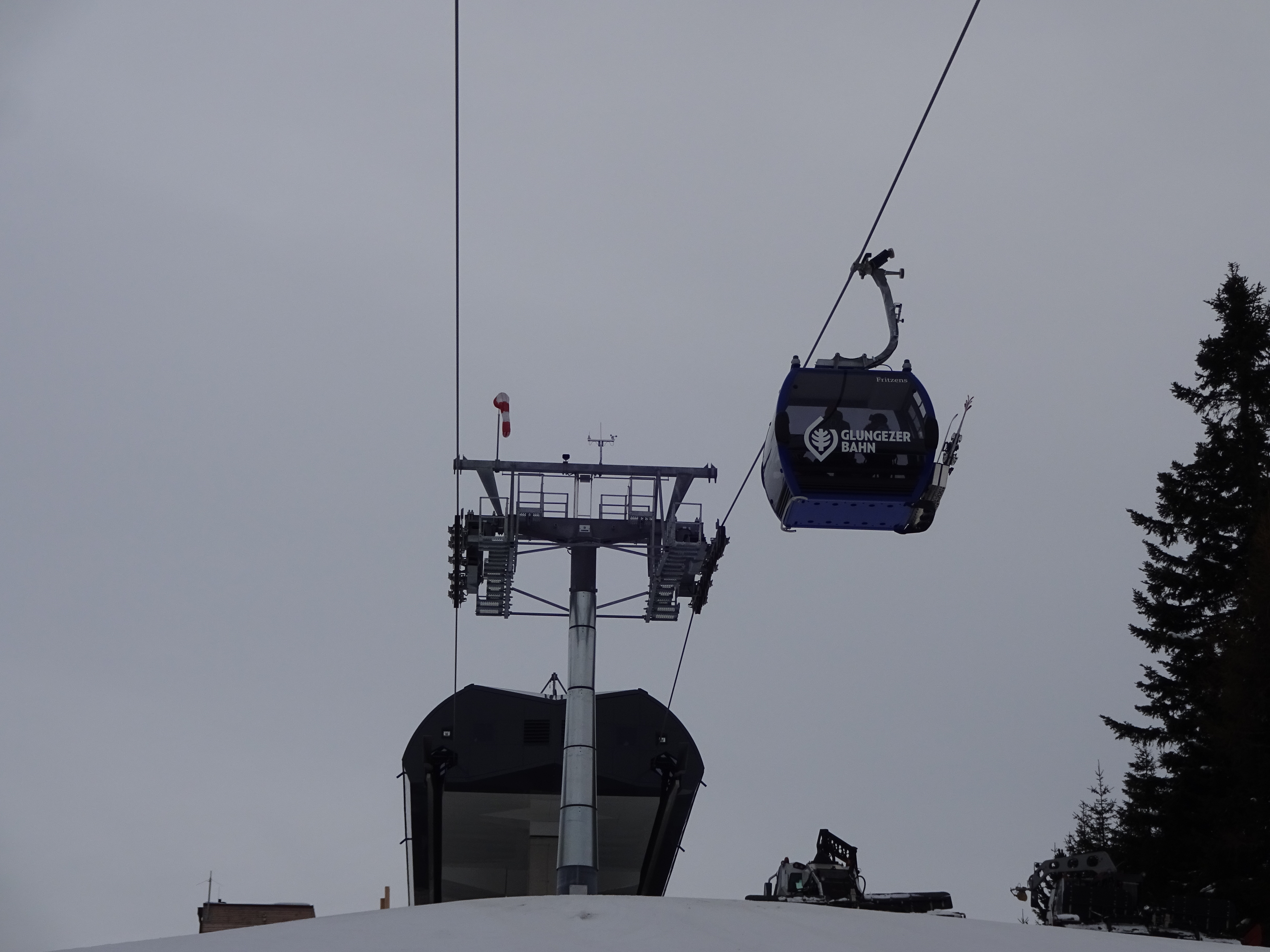 Gondel der Glungezerbahn vor der Bergstation Halsmarter